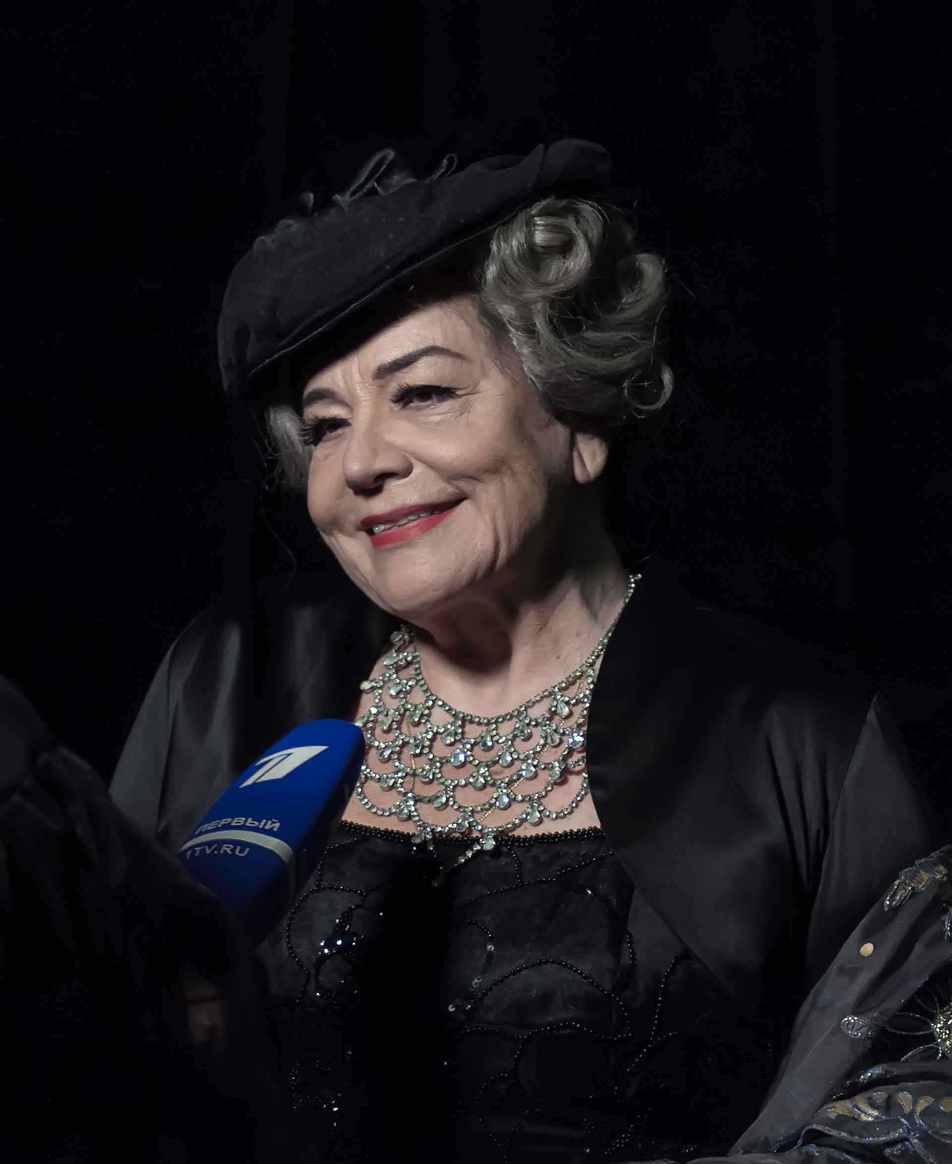 спектакль